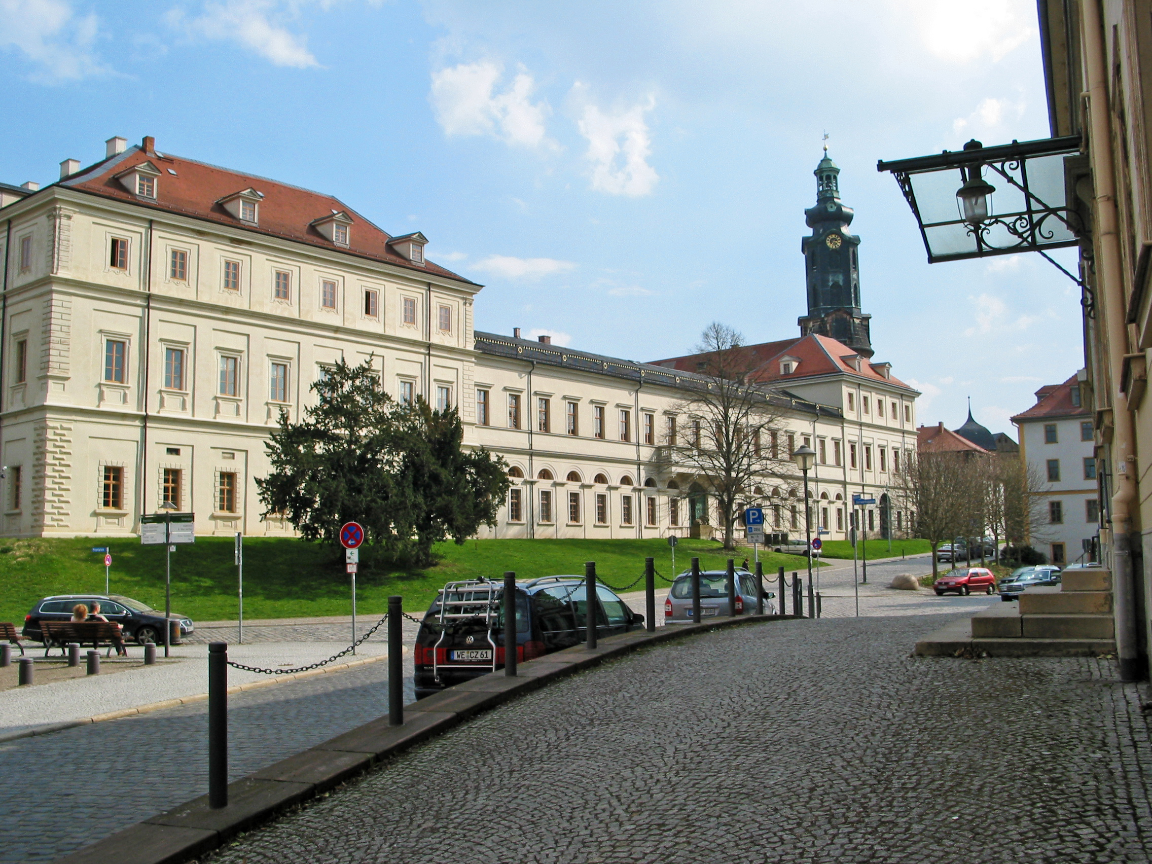 Blick auf die Westseite des Weimarer Stadtschlosses (Residenzschloss).